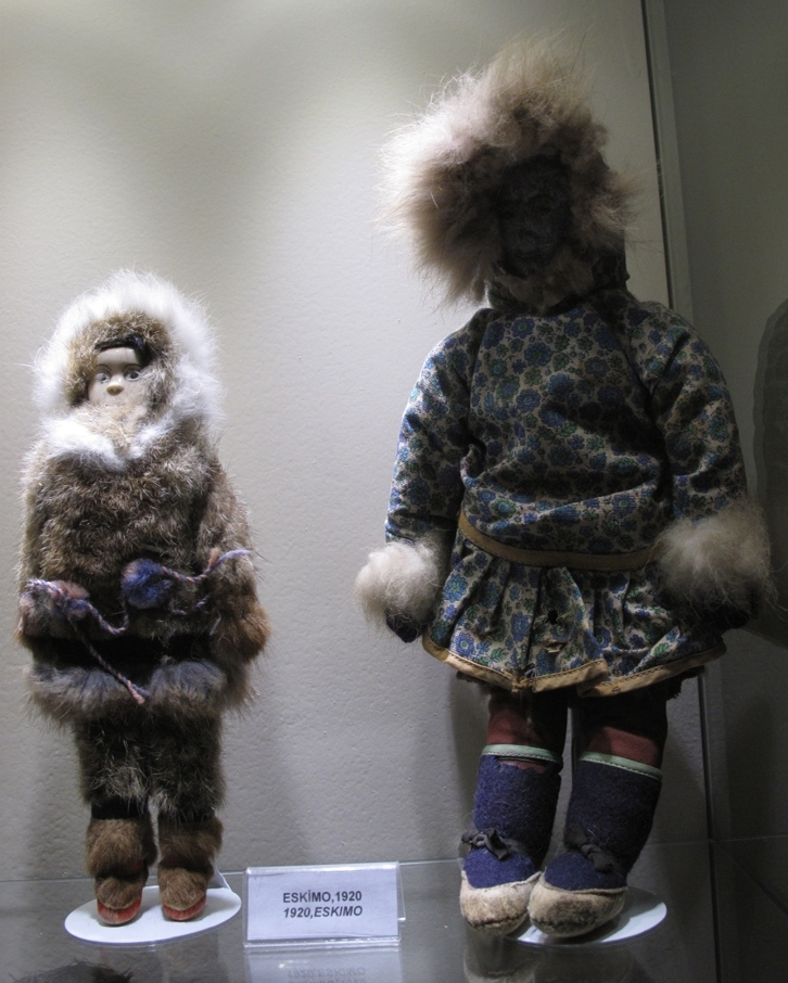 İstanbul Oyuncak Müzesi - Eskimo oyuncakları 1920